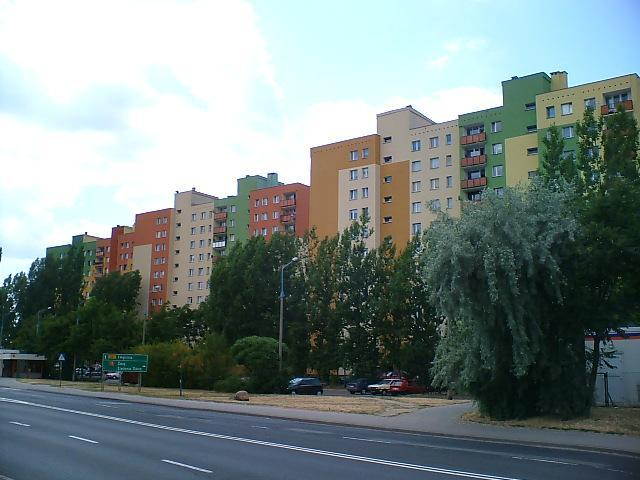 Wieżowce na os. Kopernik od strony ul. Legnickiej